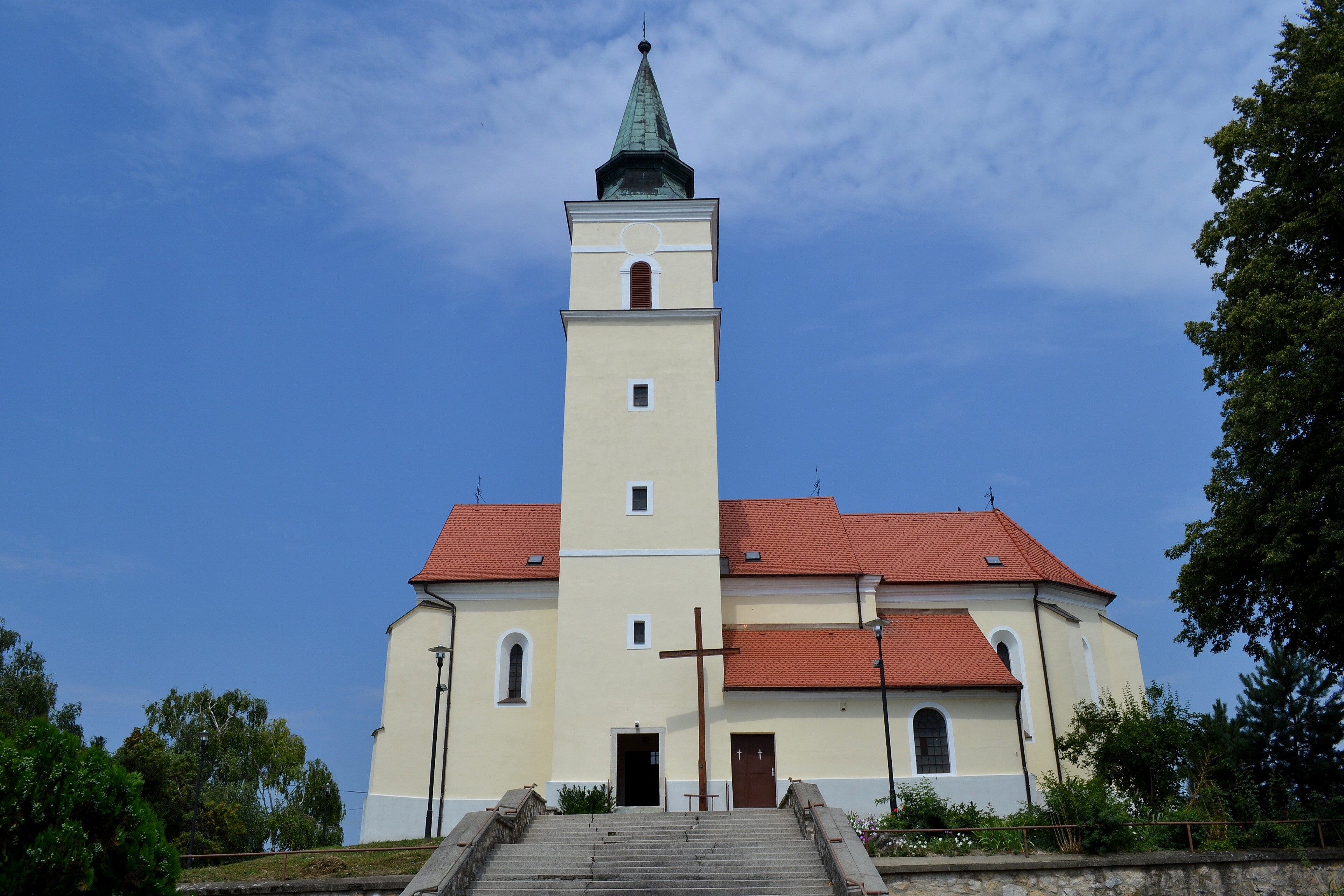 Kostolište (okr. Malacky), Kostol svätého Martina; celkový pohľad z juhu